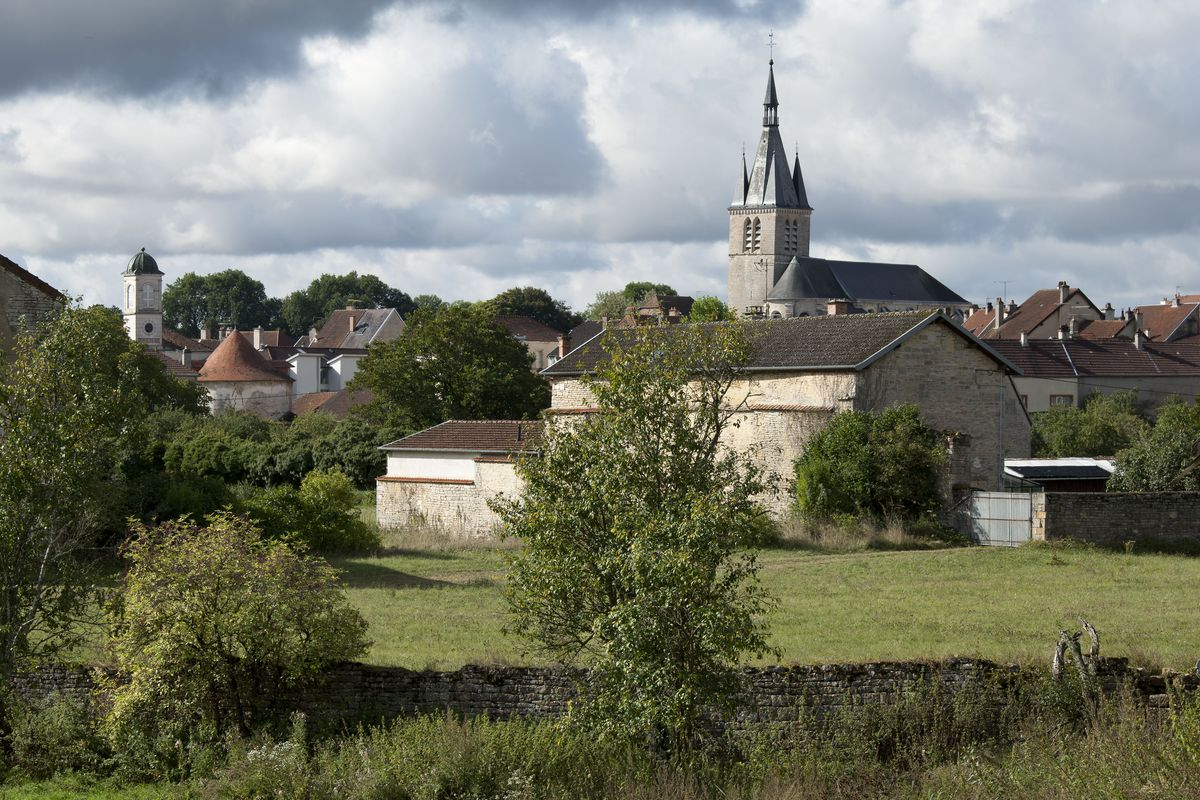 Châteauvillain : vue générale sur la cité